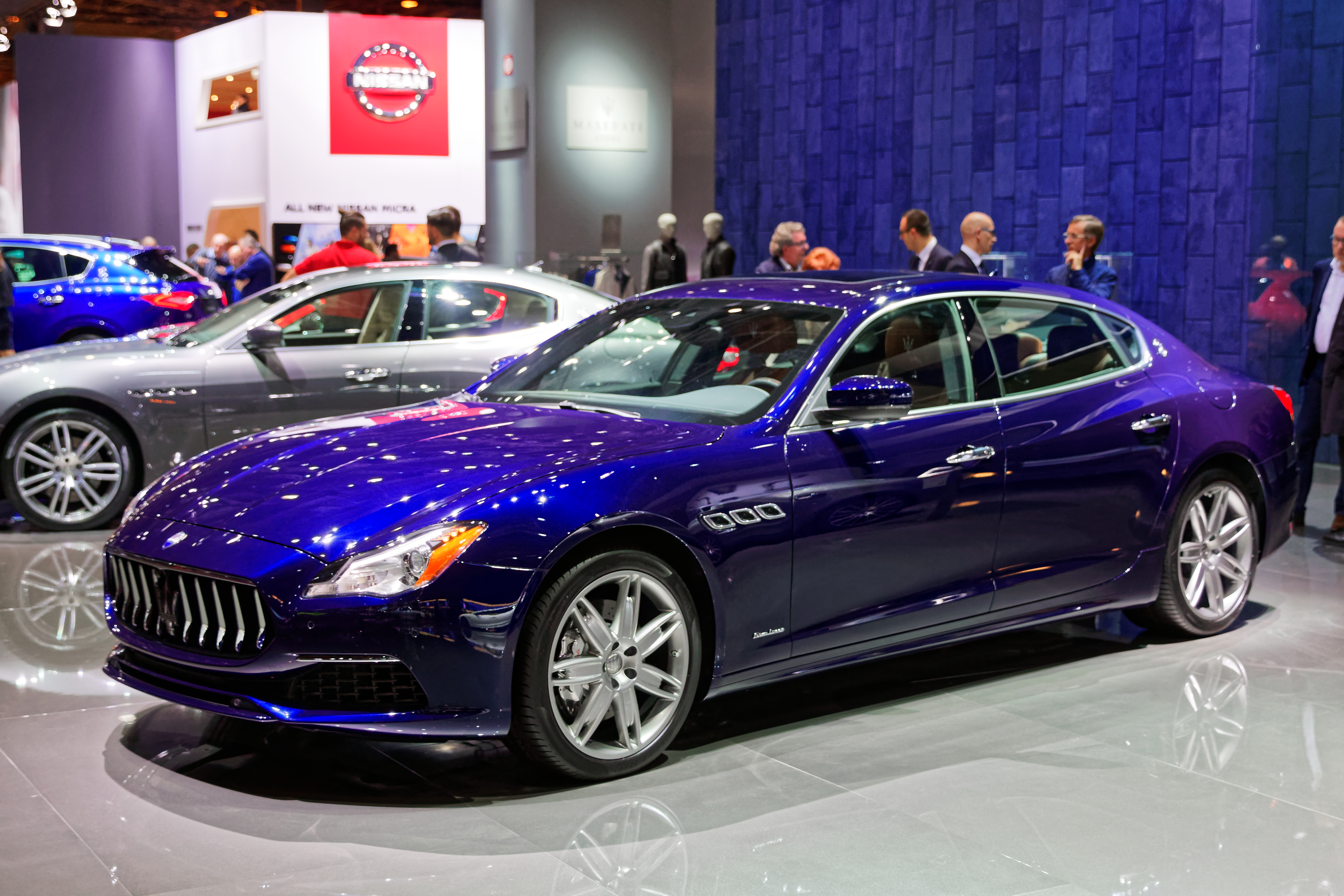 Une Maserati Quattroporte S Q4 présentée lors du mondial de l'automobile de Paris 2016.